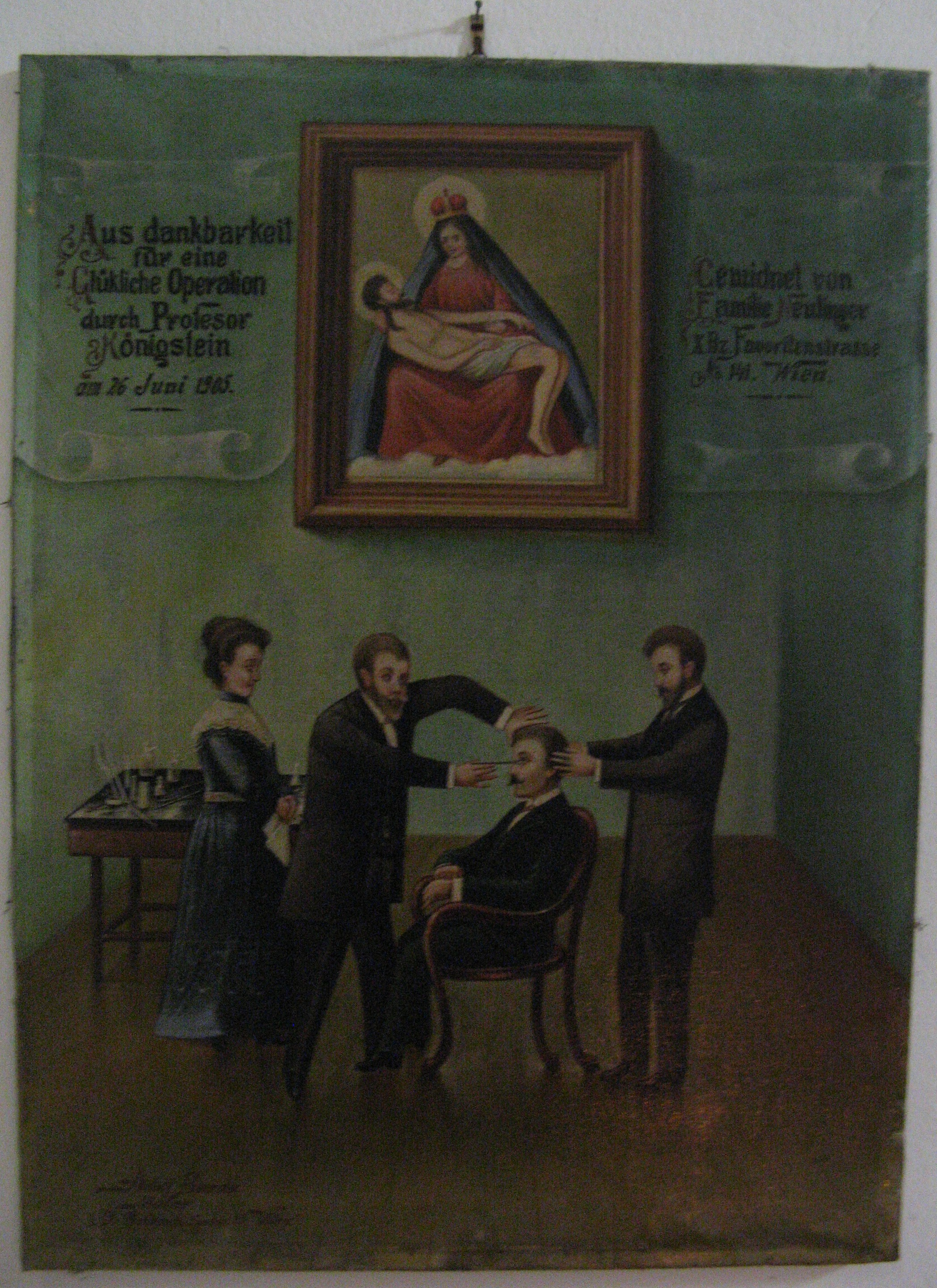 Votivbild (1905), Wallfahrtskirche Maria Lanzendorf, Niederösterreich